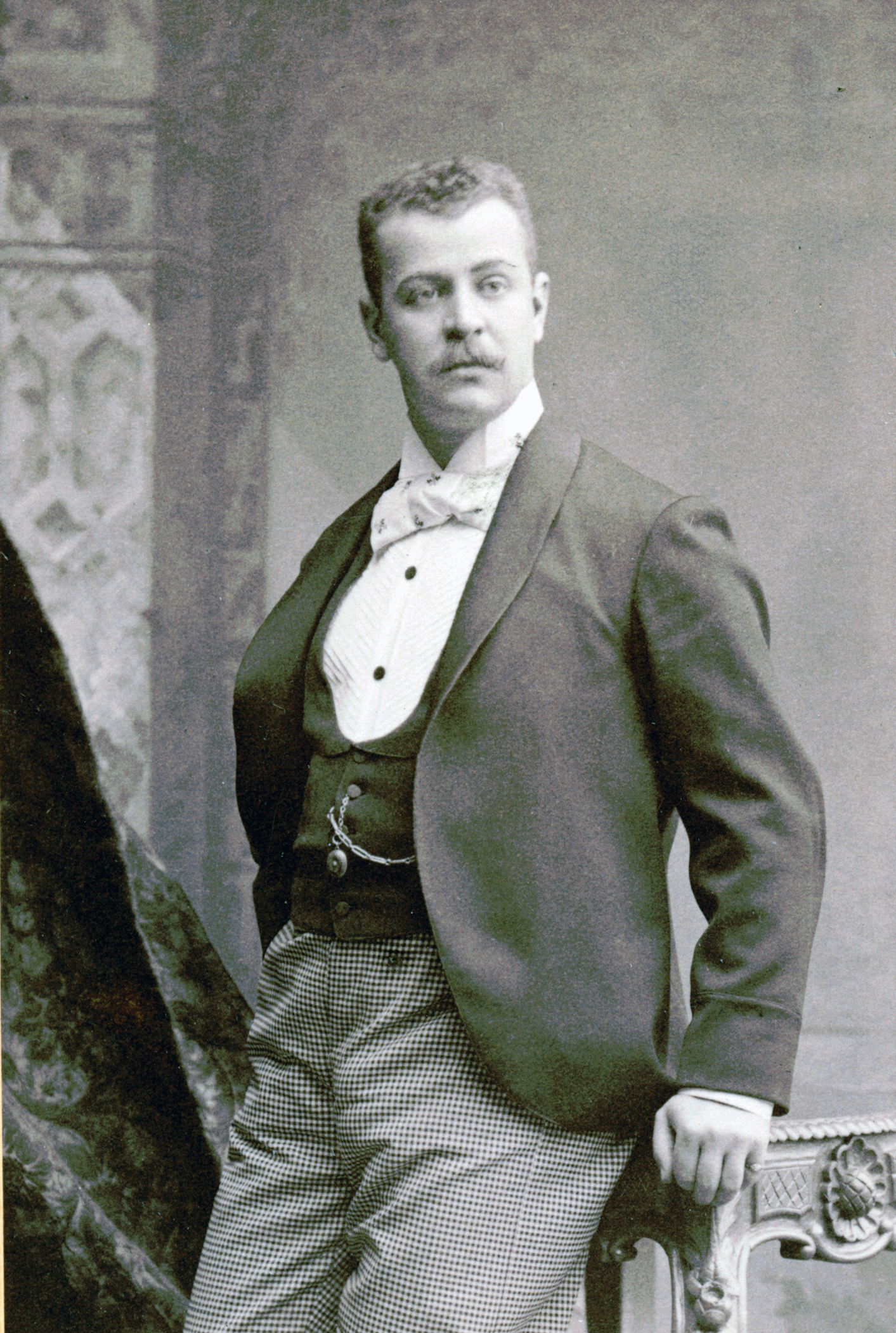 Fredrik Hedlund, skådespelare vid Kungliga Dramatiska teatern 1892